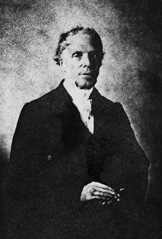 Image ancienne du Pasteur Jacques Reclus